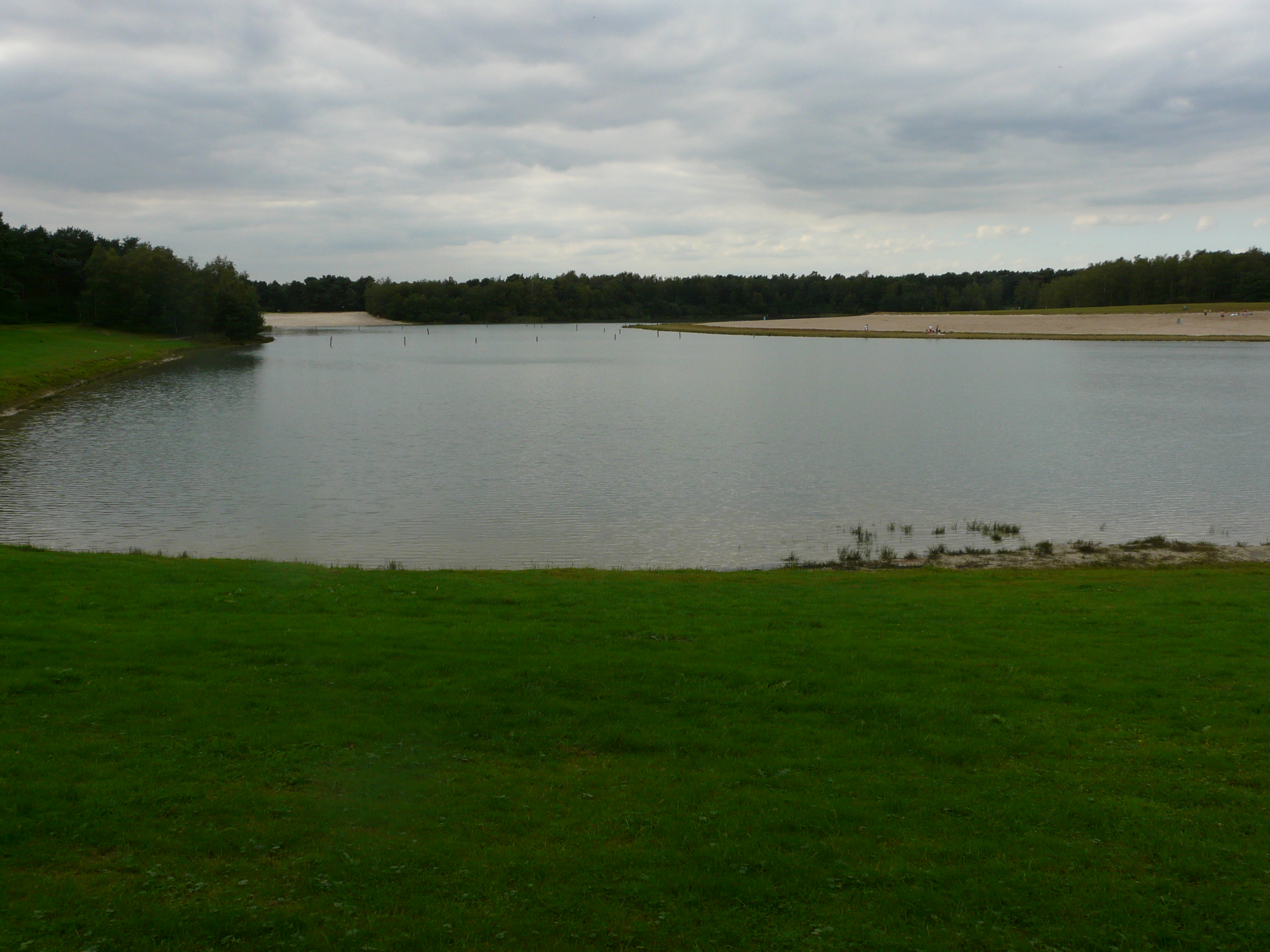 Natuurbad 't Zand buiten Alphen (Noord-Brabant)